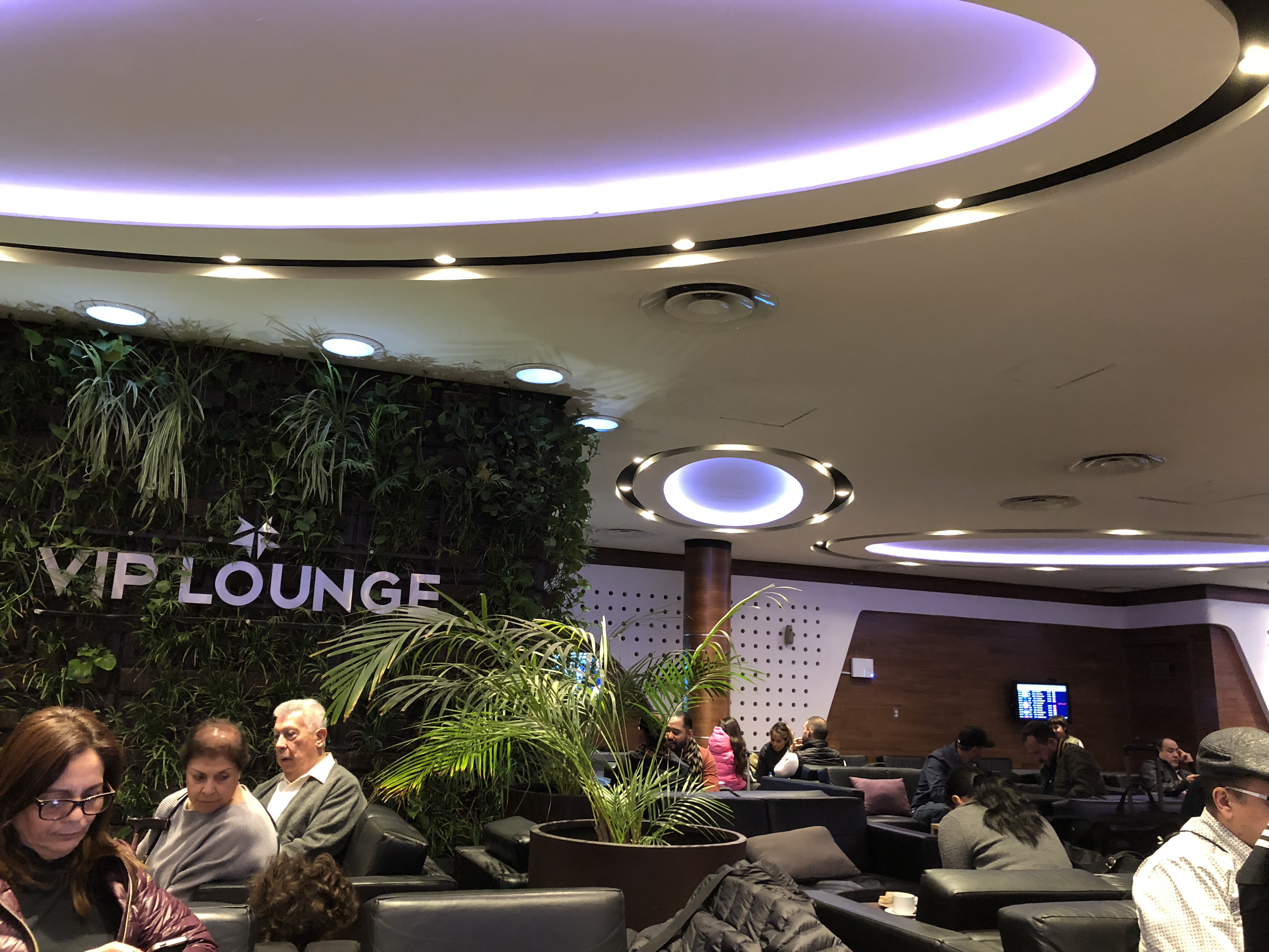 VIP Lounge (este) en el Aeropuerto Internacional de Guadalajara.